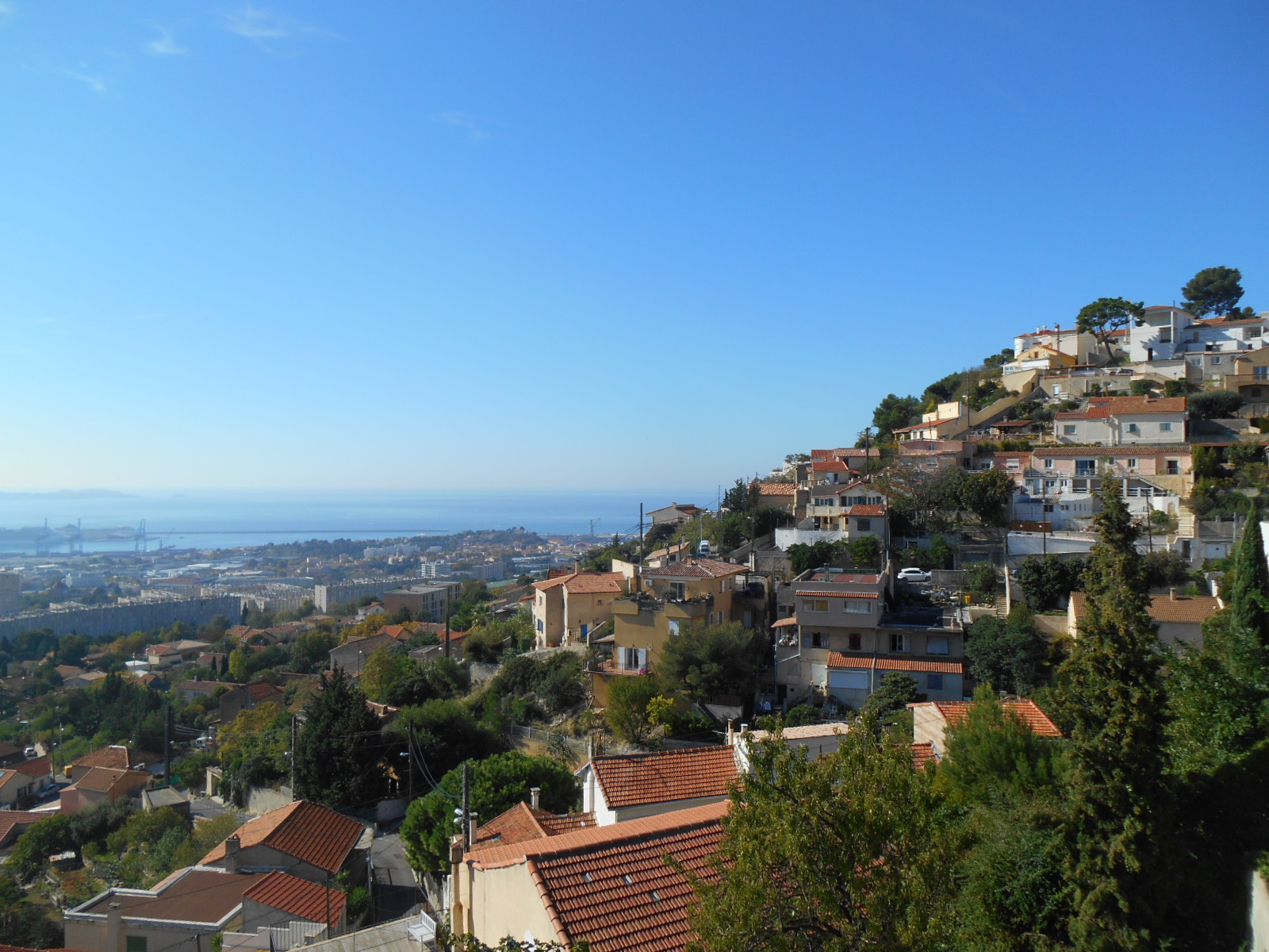 les maisons à flanc de colline